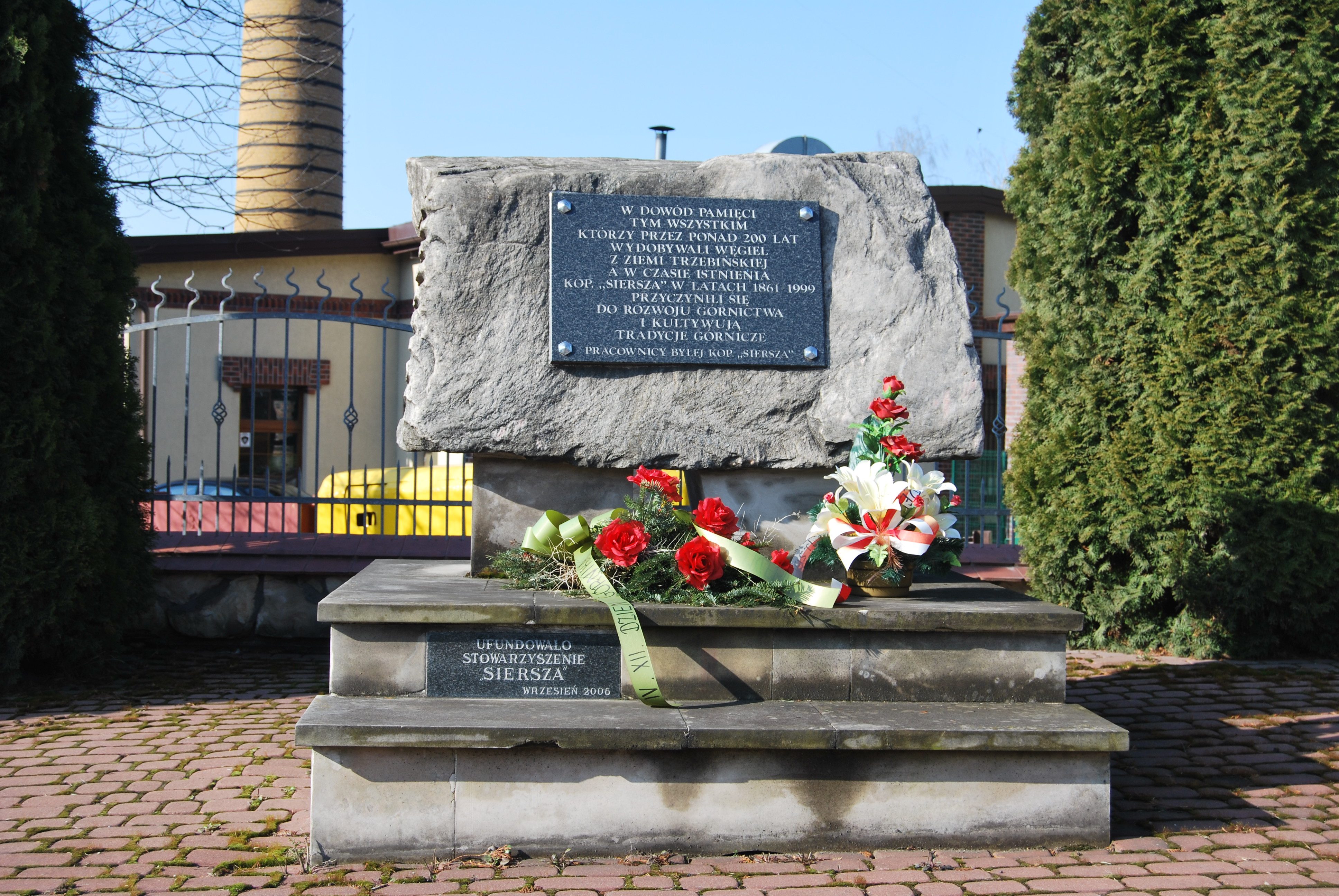 Tablica poświęcona pracownikom Kopalni "Siersza" przed budynkiem Muzeum Regionalnego w Trzebini (2015).